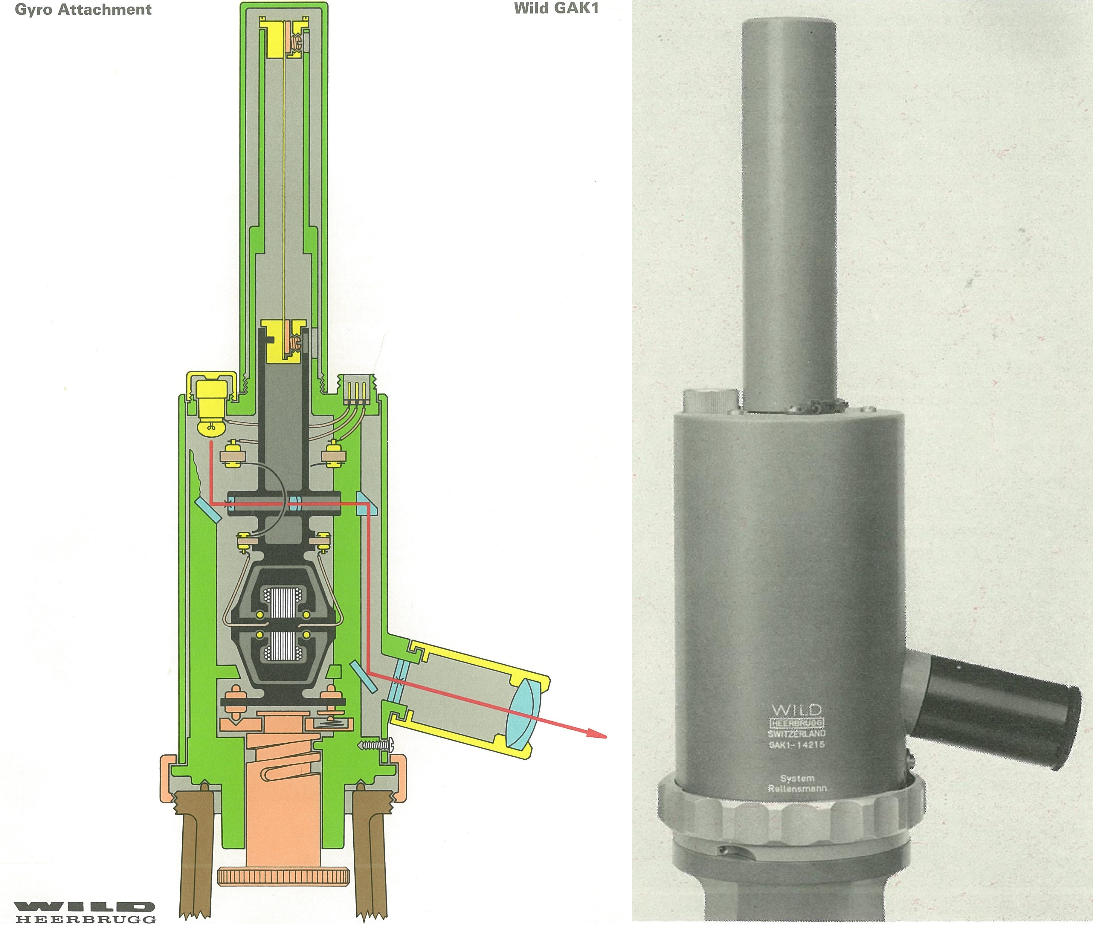 Схема на жироприставака Wild GAK1